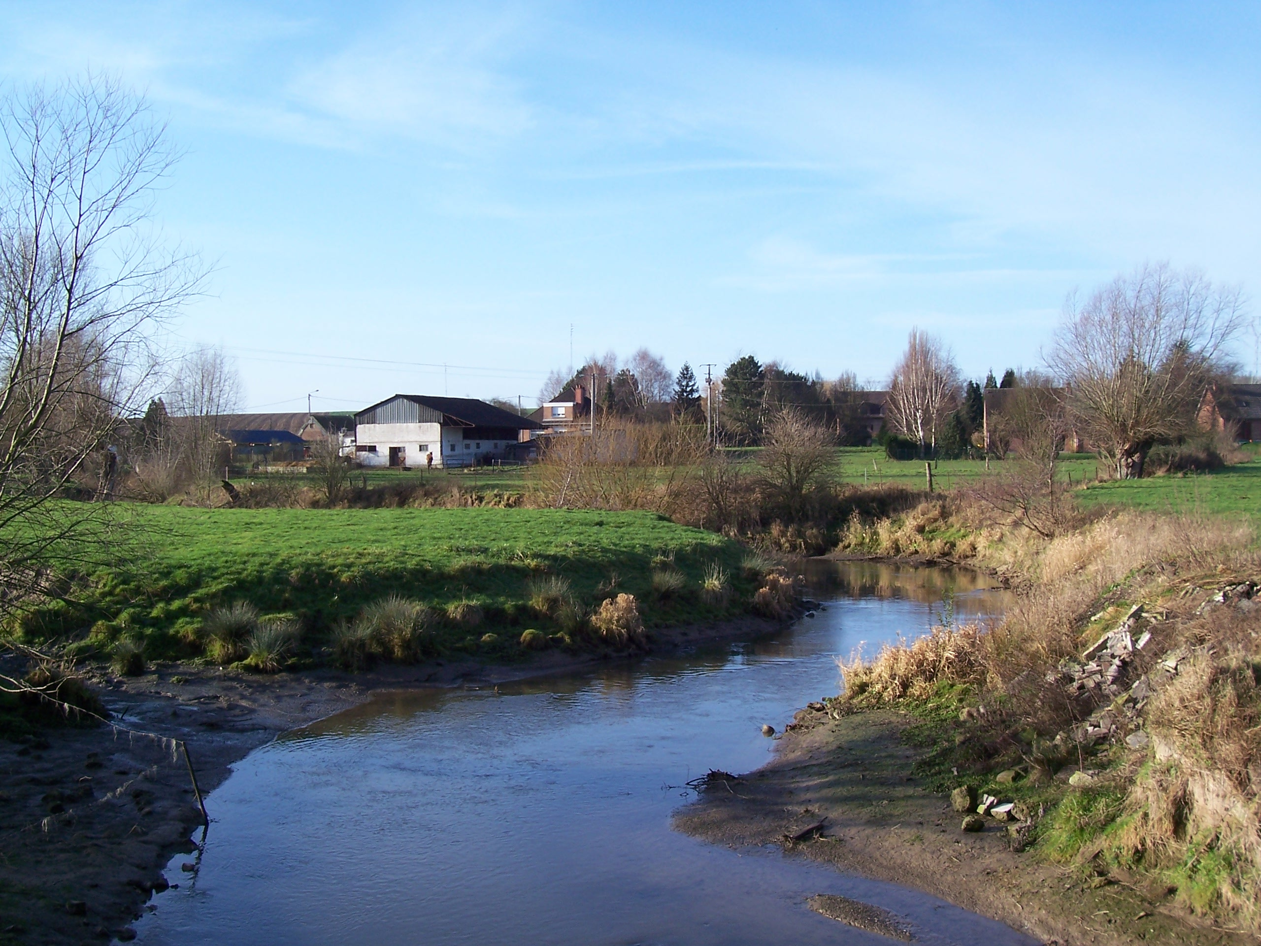 L'écaillon à Mochaux